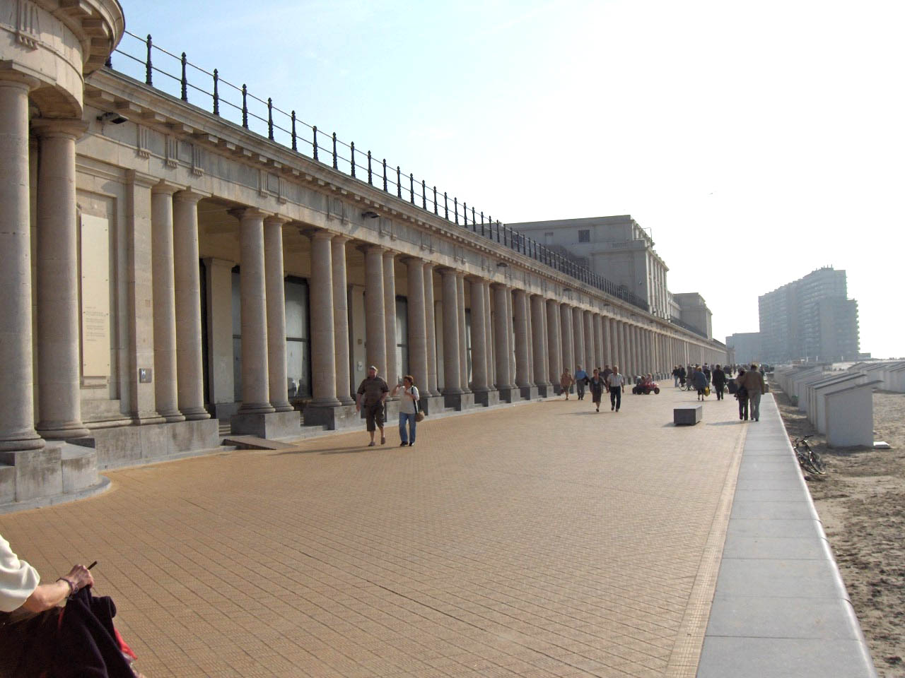 Thermae Palace with gallery (Koninklijke Gaanderijen), Ostend, Belgium